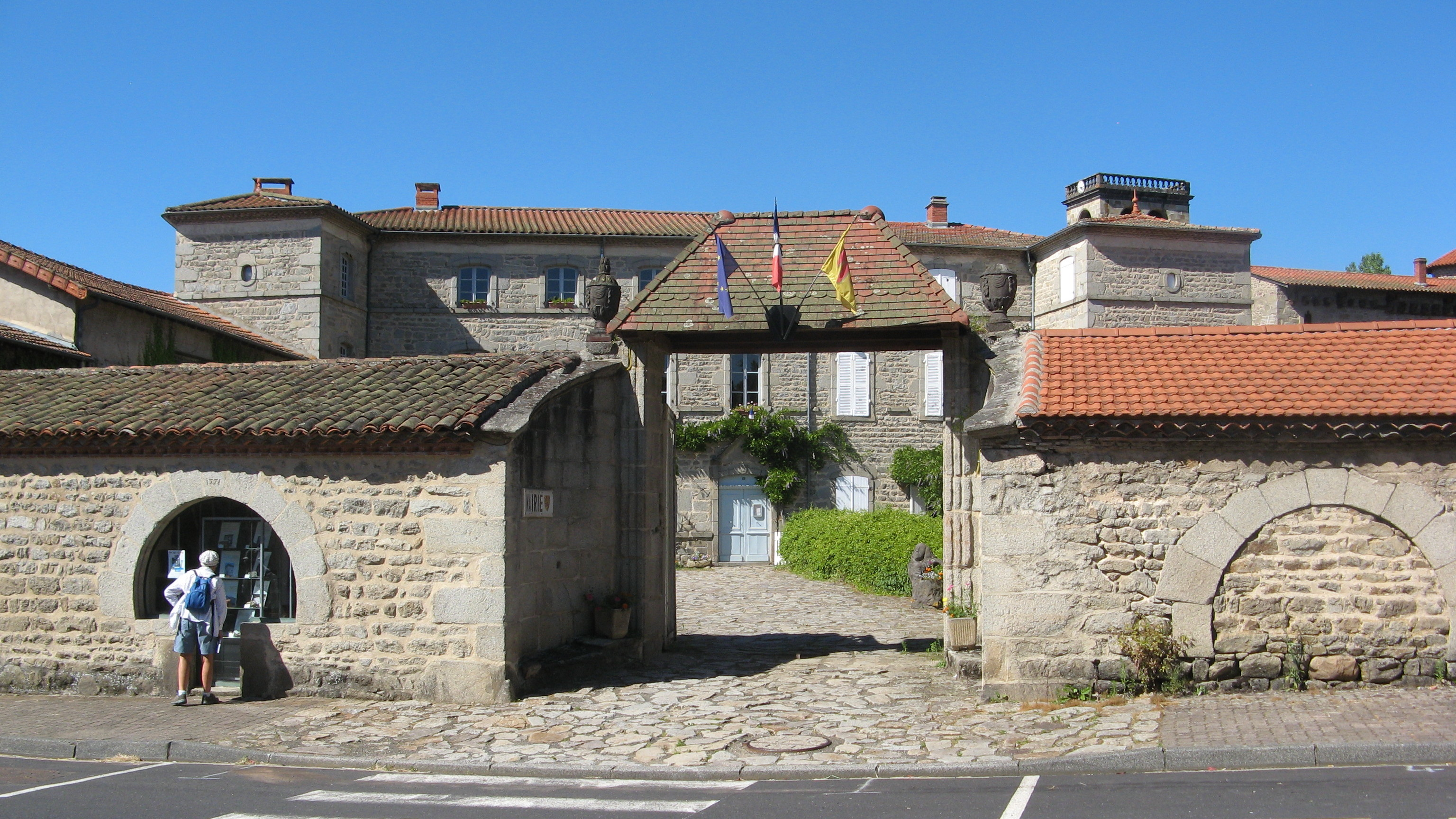 Saint-Dier-d’Auvergne, mairie dans l'ancien hôtel de Costilhes .